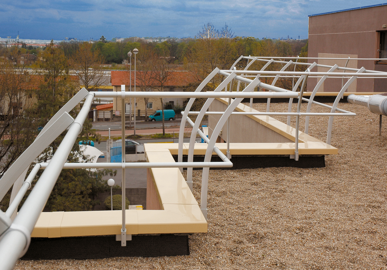 Garde-corps en aluminium pour toitures inaccessibles